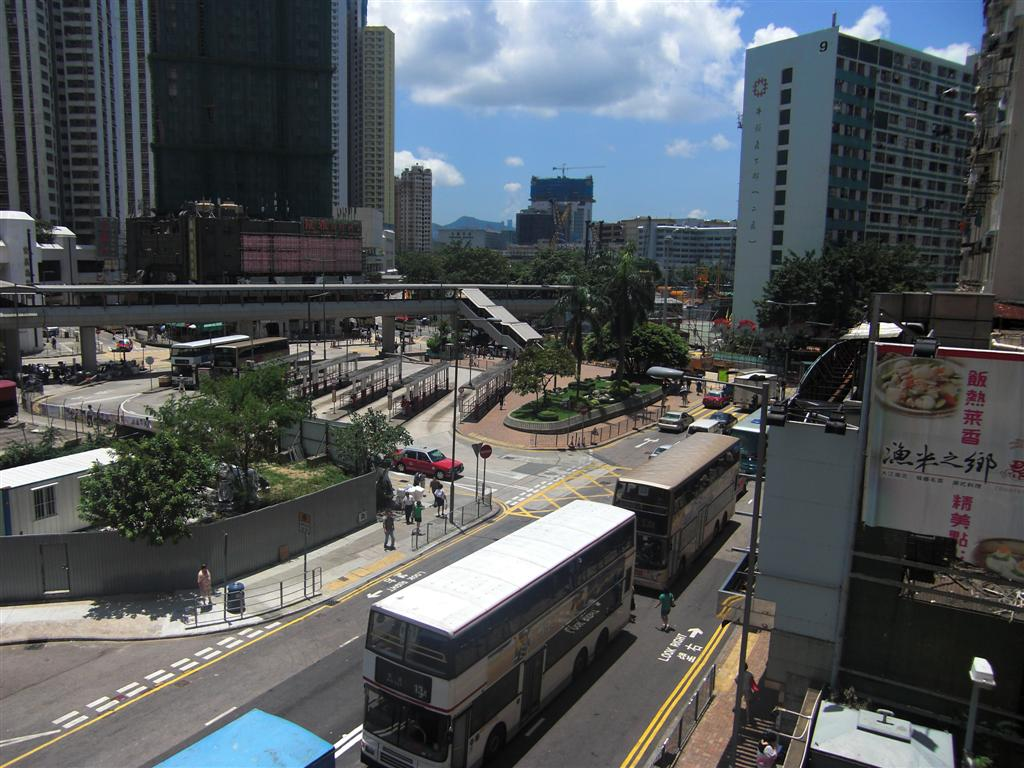 佐敦谷北道